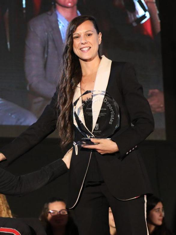 La delegada del Área de Políticas de Género y Diversidad, Celia Mayer, ha reclamado hoy a la sociedad varias acciones encaminadas a conseguir la práctica de deporte en igualdad, durante la ‘I Gala de Mujeres Deportistas’ celebrada en el Ayuntamiento de Madrid para reconocer la labor de las mujeres que practican deporte femenino de élite.